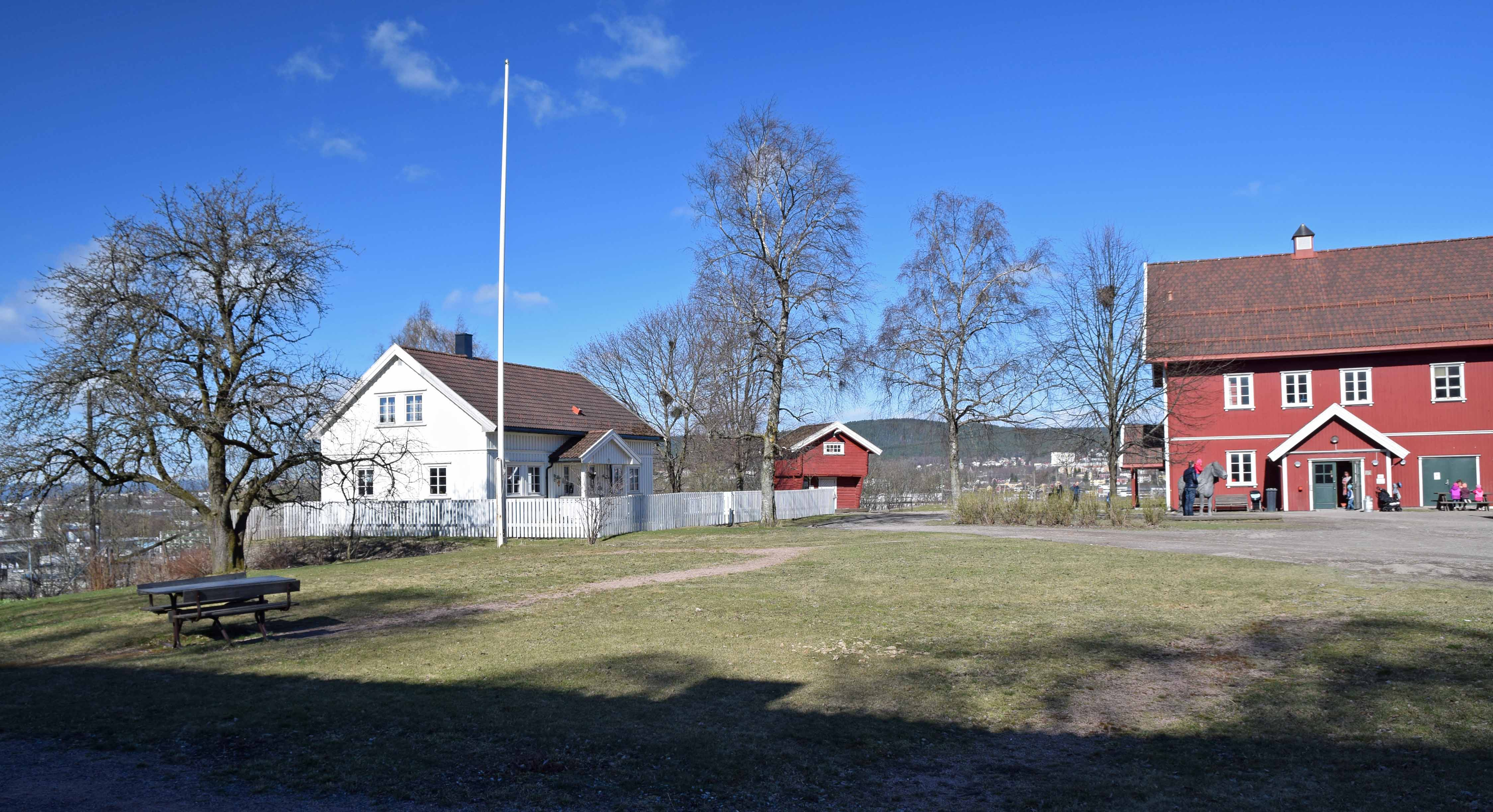 Nordre Lindeberg gård, tidligere 4H-gård, Furuset, framhus